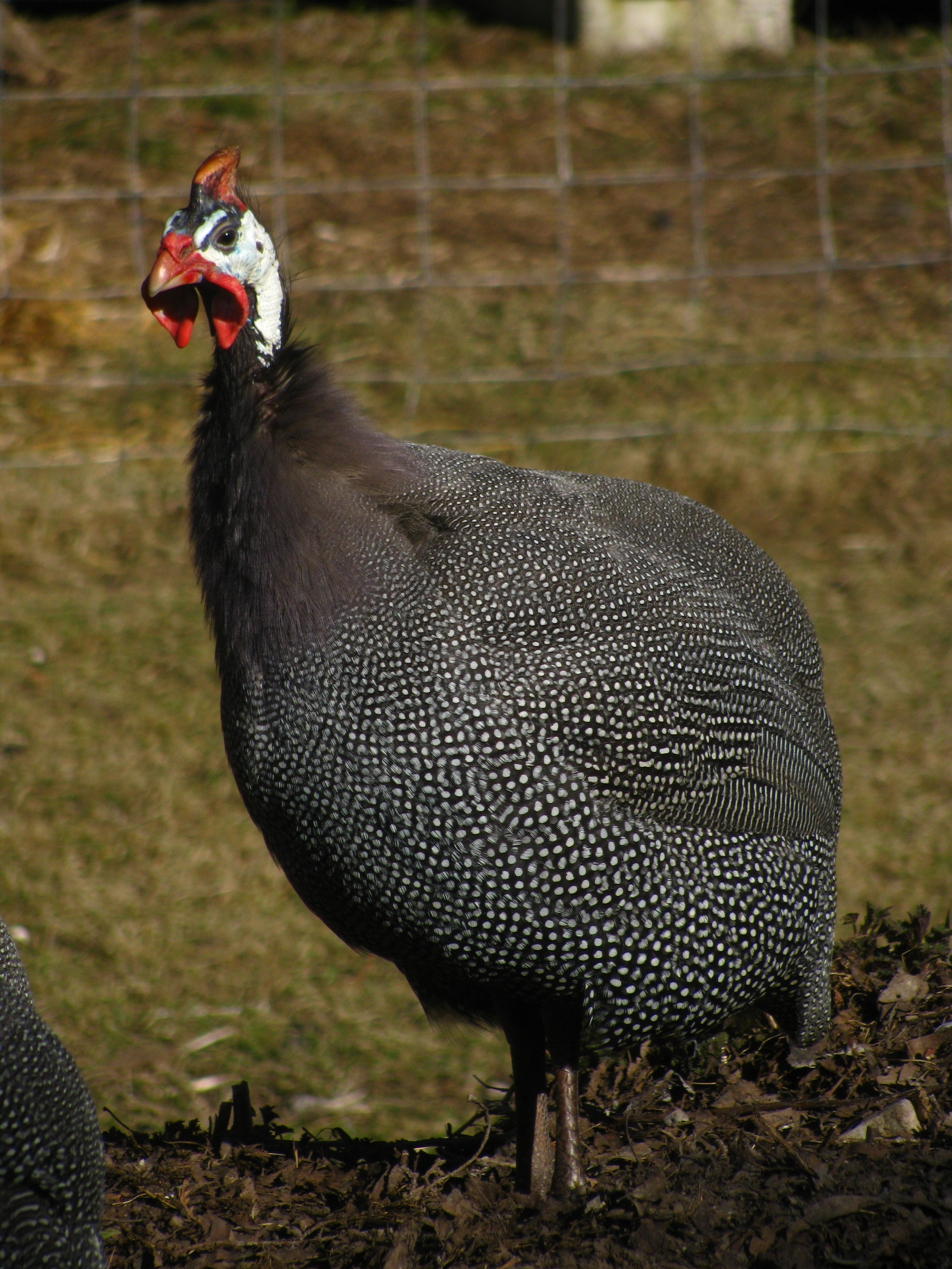 Guinea fowl kiiver-pärlkana, Numida meleagris adult bird